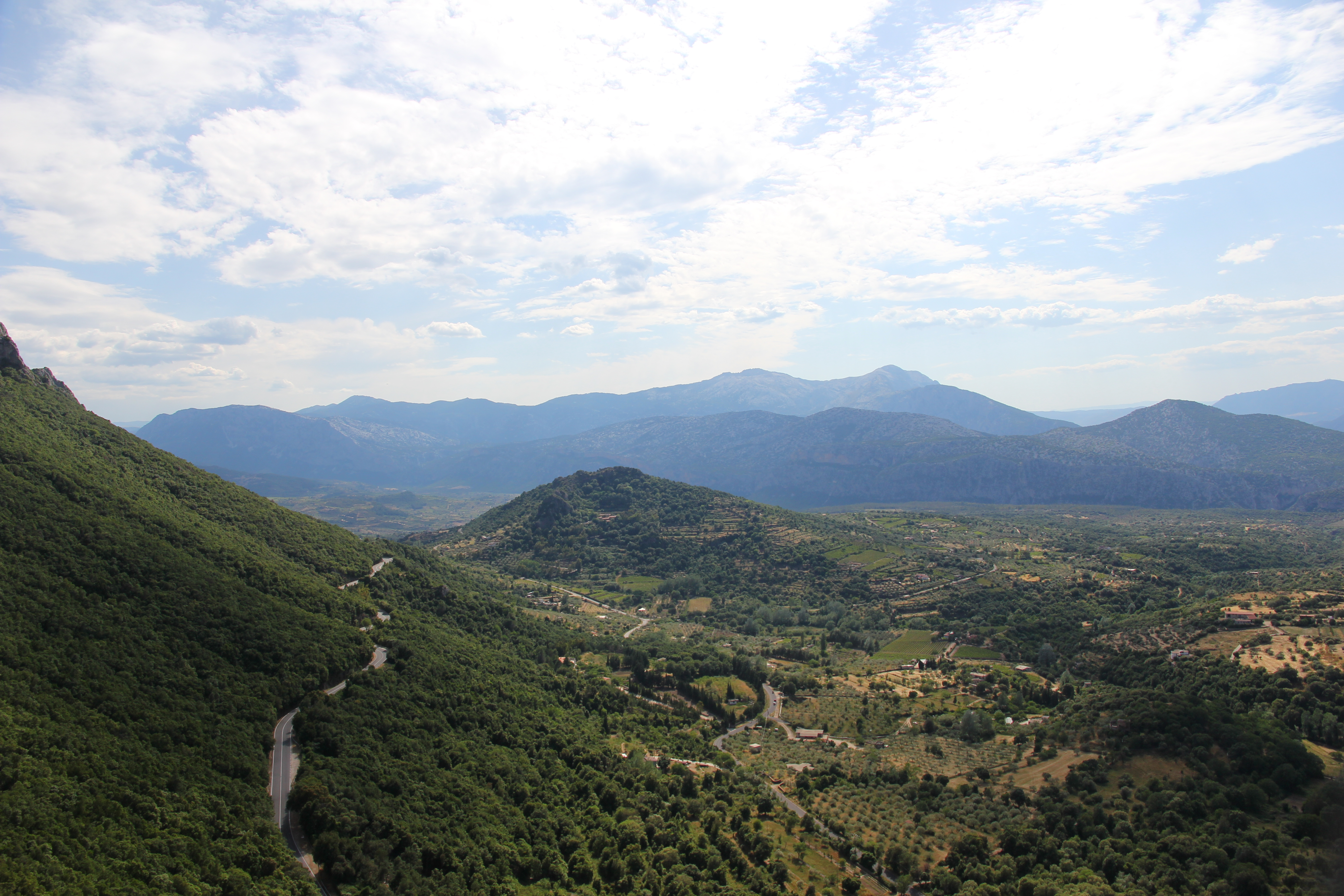 Oliena - Supramonte